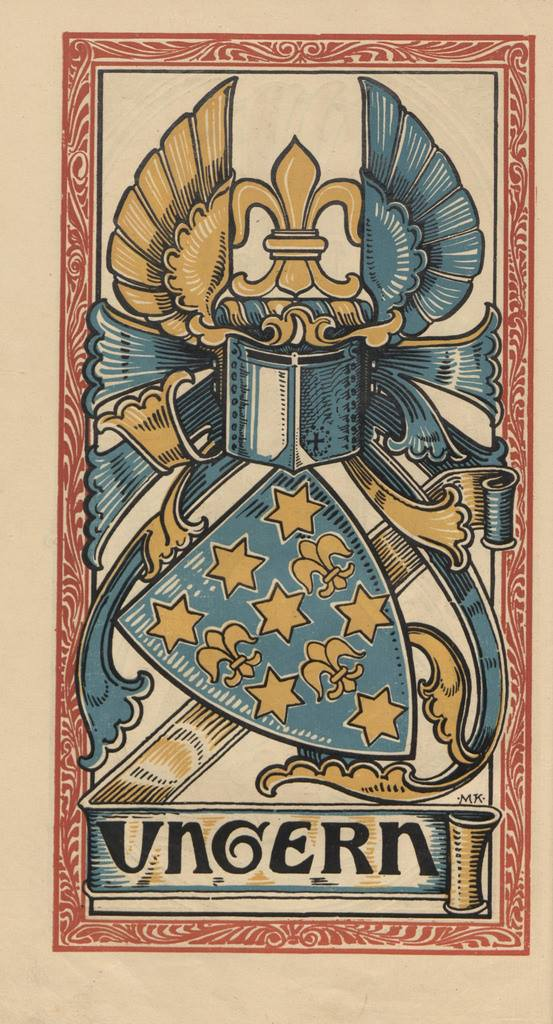 Armoiries de la famille von Ungern-Sternberg, par Martin Kortmann, Baltischer Wappen-Kalender 1902, Riga.